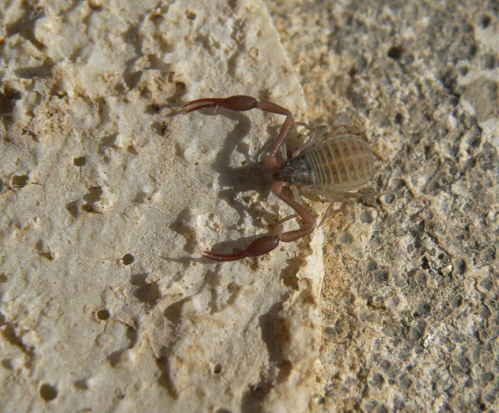 Garypus japonica：イソカニムシ 2008/11/29 和歌山県中部海岸：wakayama pref. Japan